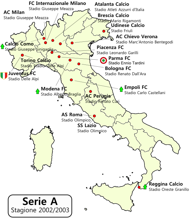 Distribuzione geografica squadre Serie A 2002-2003